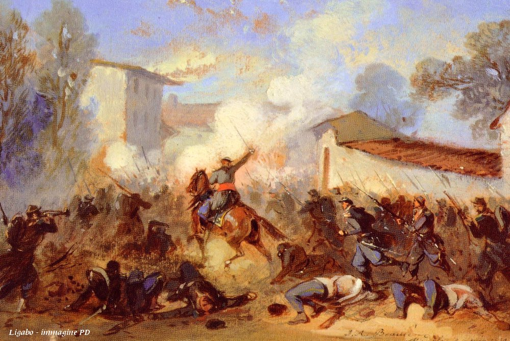 J. A. Beaucé, Battaglia di Medole. Il tenente colonnello Ernest De Neuchèze guida l'8º reggimento di fanteria francese all'assalto dell'abitato di Medole, difeso dal 52º reggimento di fanteria croata "Arciduca Francesco Carlo". Ore 5.00 a.m. del 24 giugno 1859. É l'inizio della Battaglia di Solferino e San Martino